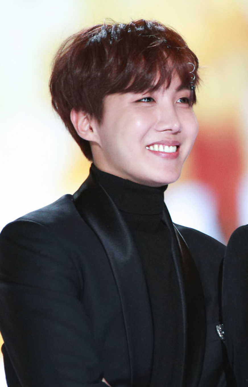 180125 방탄소년단 제이홉